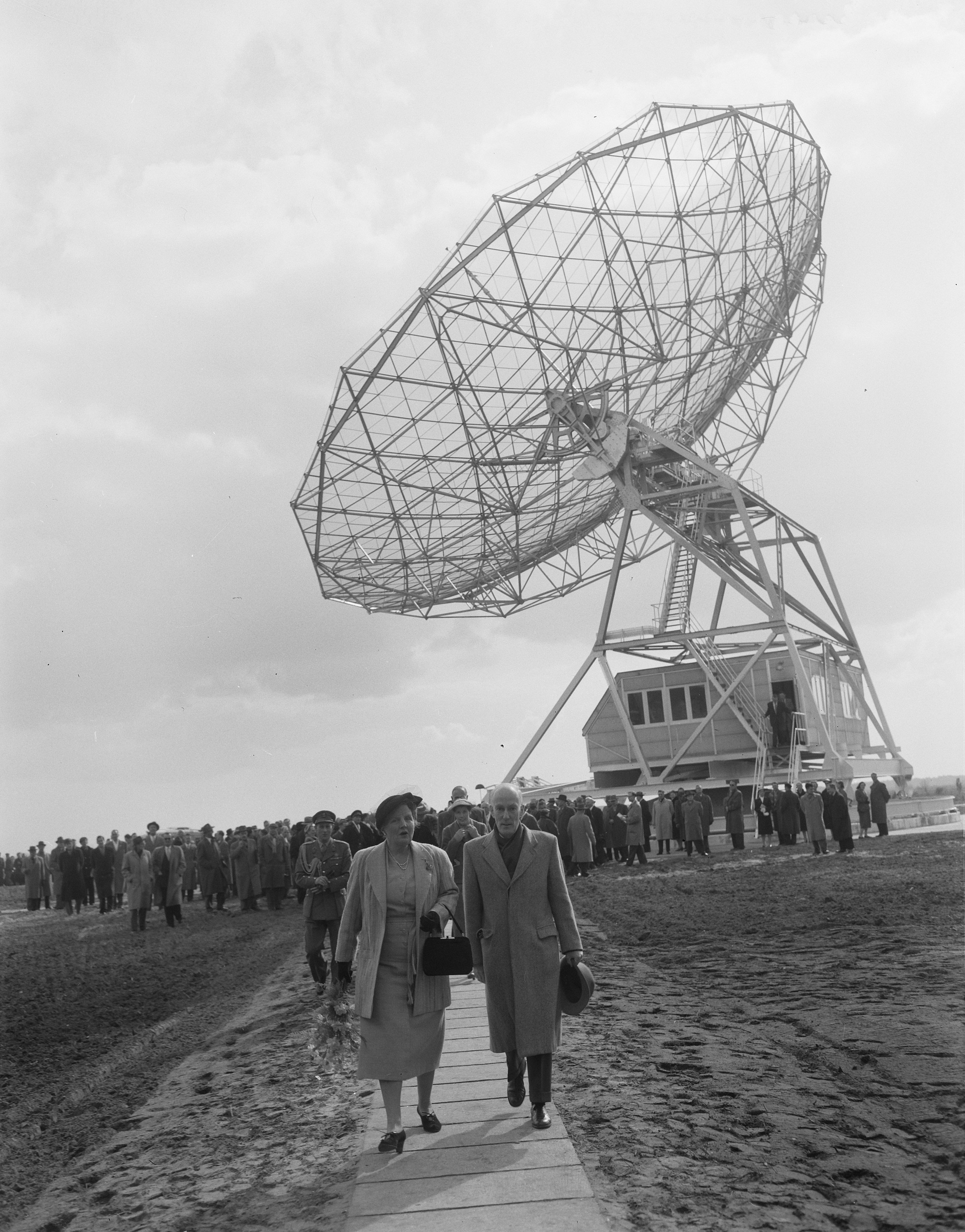 Collectie / Archief : Fotocollectie Anefo Reportage / Serie : [ onbekend ] Beschrijving : Koningin Juliana stelt de radiotelescoop in Dwingeloo in gebruik Datum : 17 april 1956 Locatie : Drenthe, Dwingeloo Trefwoorden : koninginnen, radiotelescopen Persoonsnaam : Juliana (koningin Nederland) Fotograaf : Bilsen, Joop van / Anefo Auteursrechthebbende : Nationaal Archief Materiaalsoort : Negatief (zwart/wit) Nummer archiefinventaris : bekijk toegang 2.24.01.04 Bestanddeelnummer : 907-6947